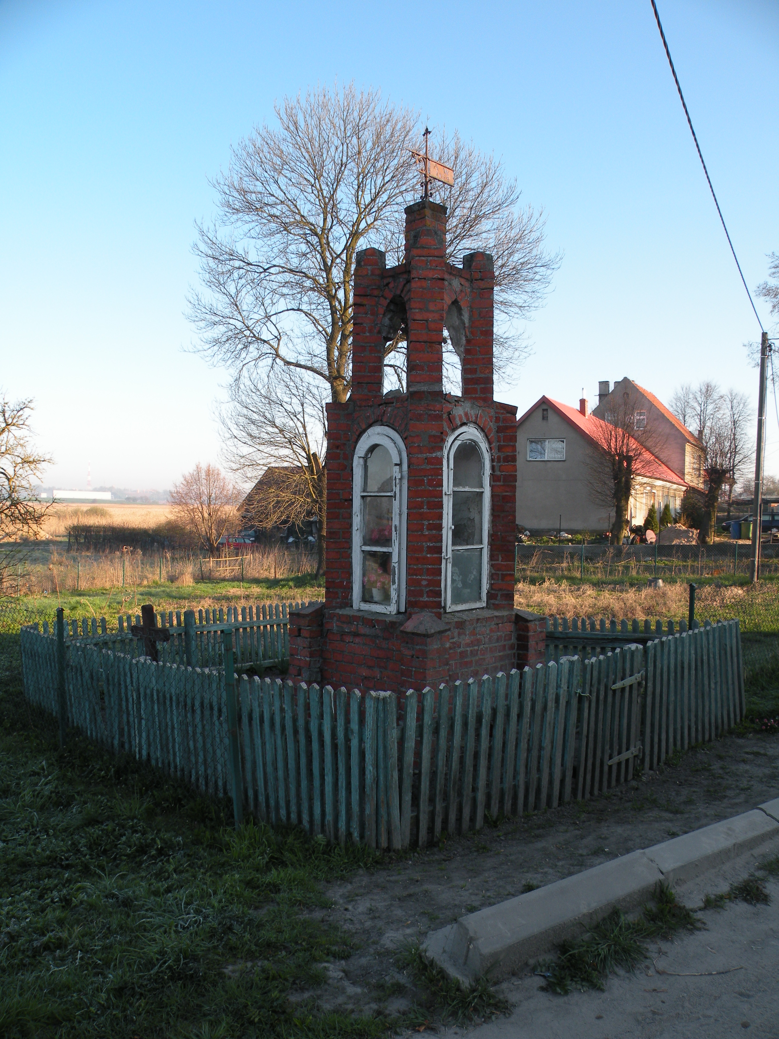 Klebark Mały, kapliczka z mogiłą w głębui wsi